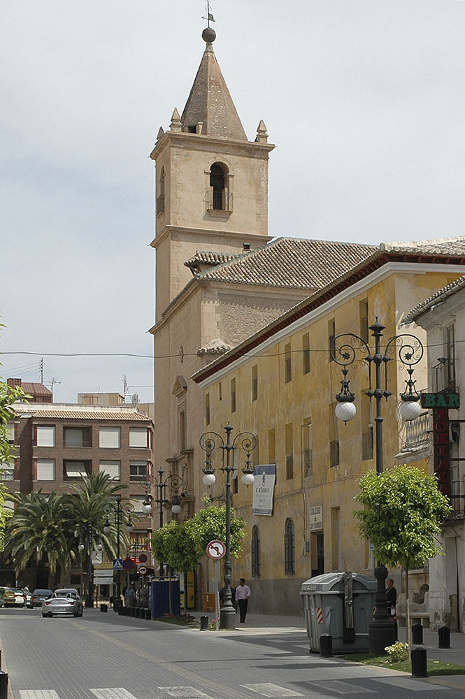 Iglesia de San Francisco de Lorca (Murcia)